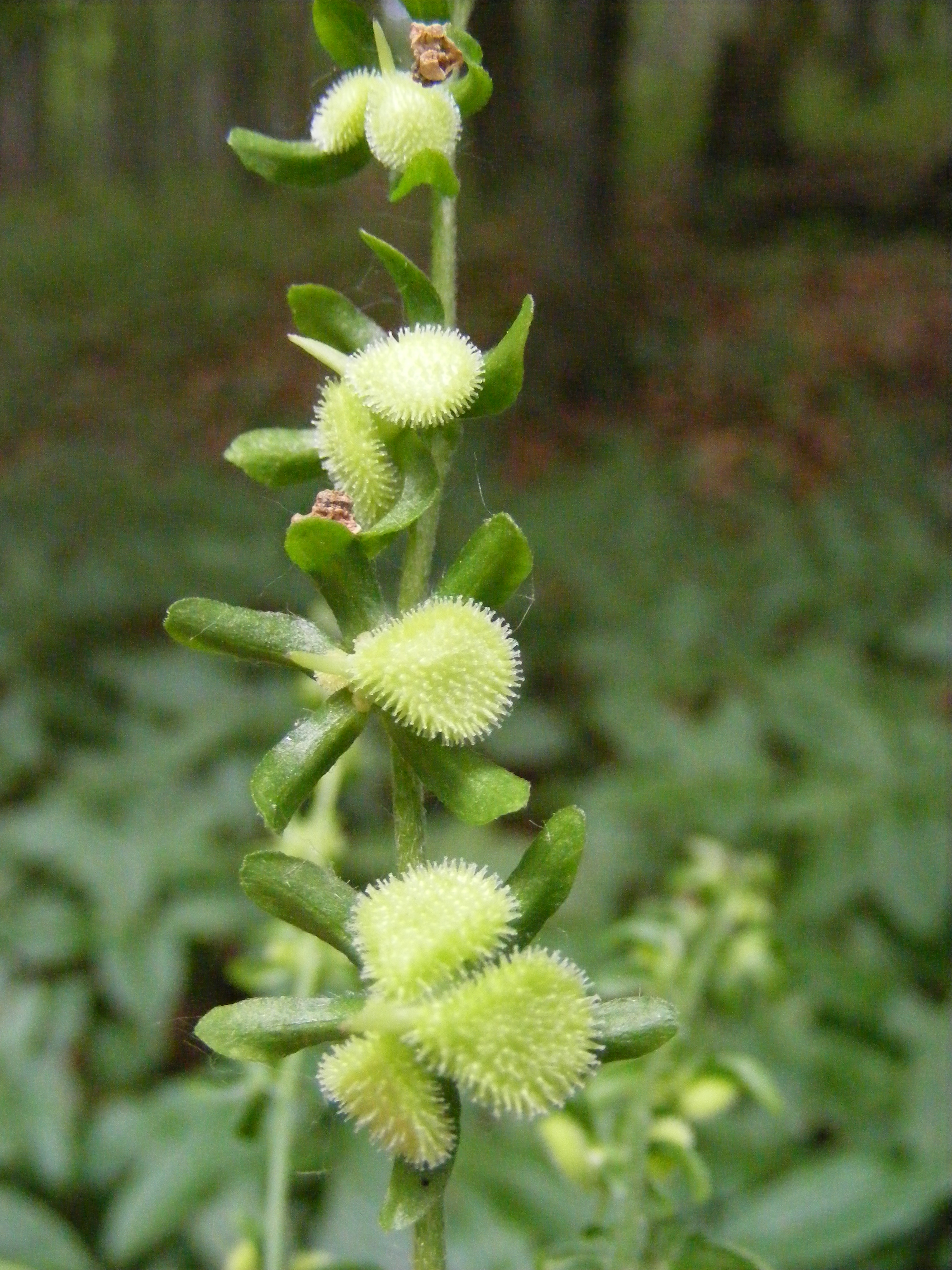 Boshondstong